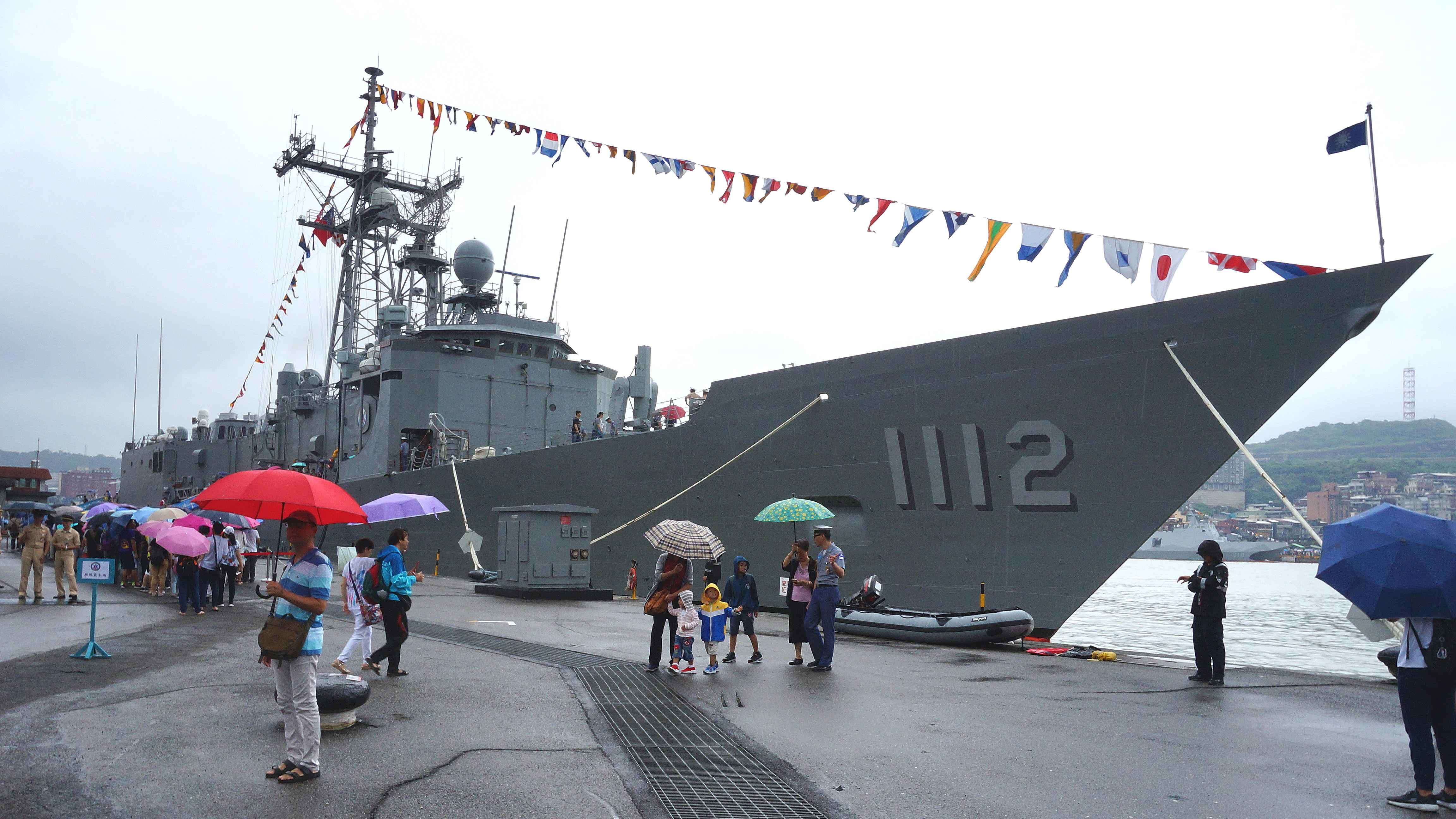 中華民國海軍基隆威海營區開放參觀，基隆港東岸海軍碼頭，銘傳軍艦艦首右舷與等待參觀本艦的遊客隊伍。